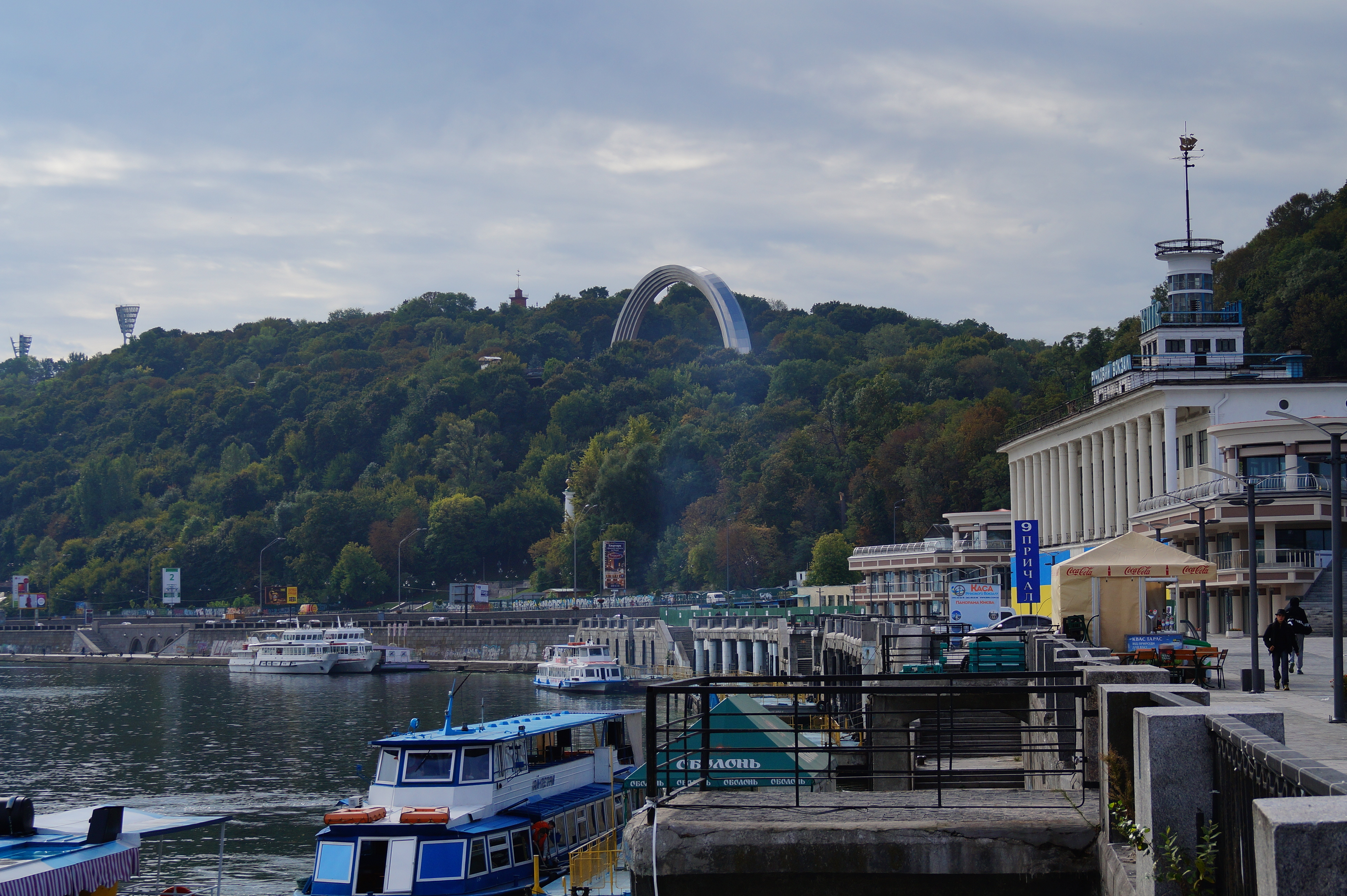 Набережна Дніпра, Київ, Набережне шосе